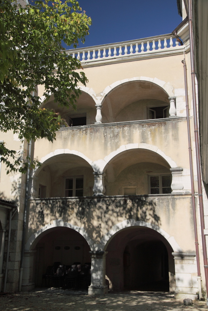 Façade sur la cour intérieure de l'hôtel Brillat-Savarin, à Belley (France)